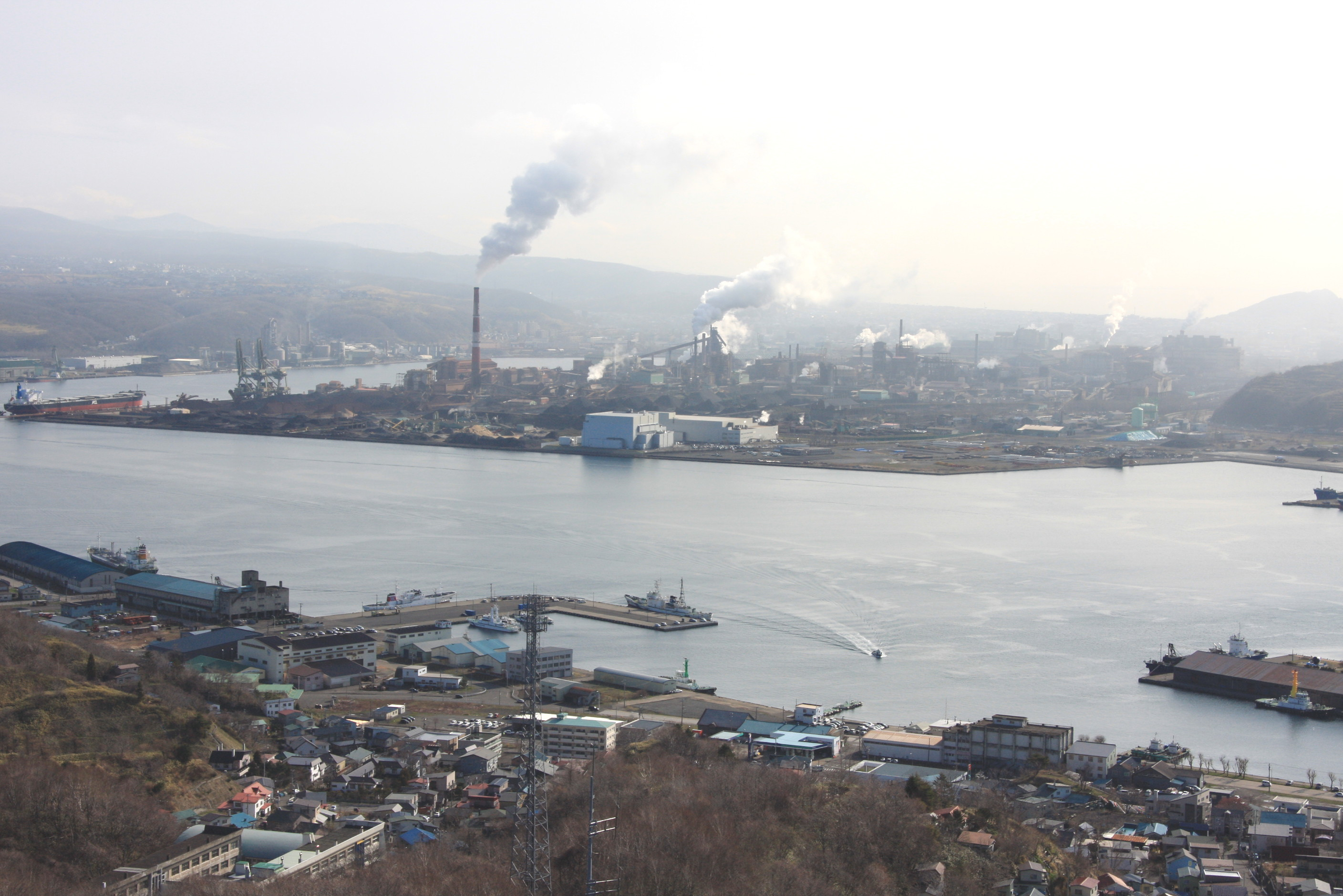 測量山より俯瞰する室蘭港